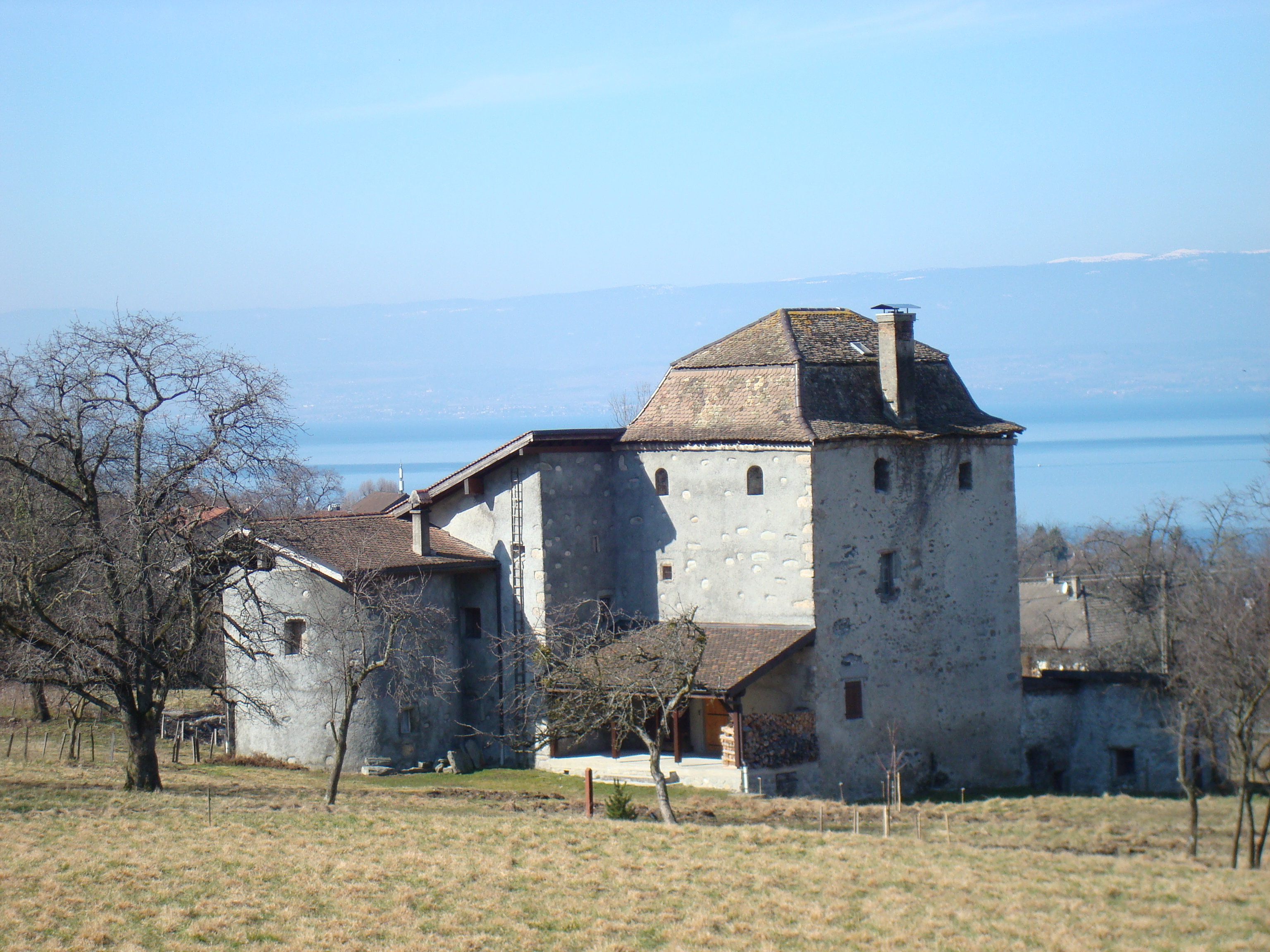 Vue de la maison forte de Chatillon à Lugrin depuis le sud-est.